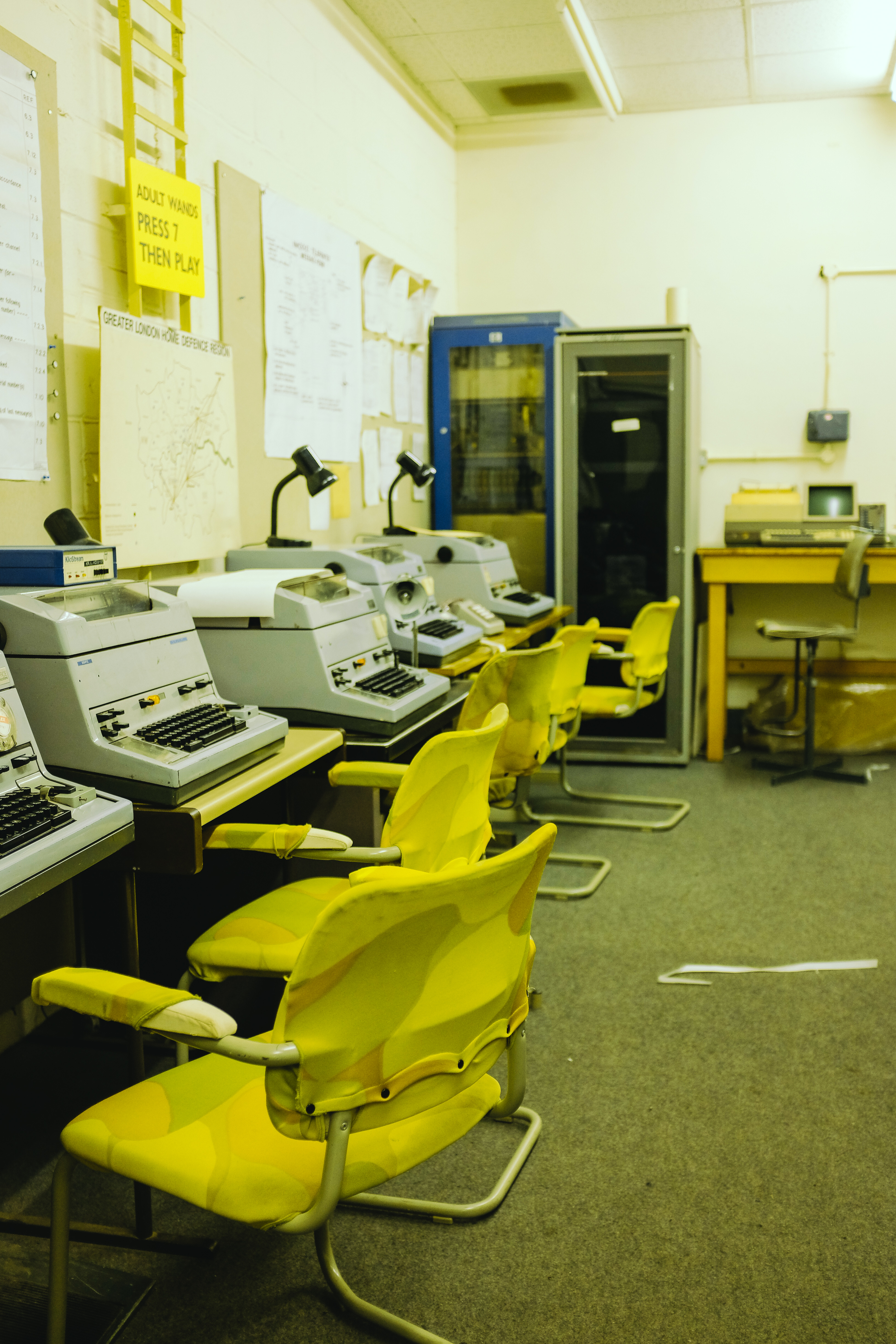 Fujifilm